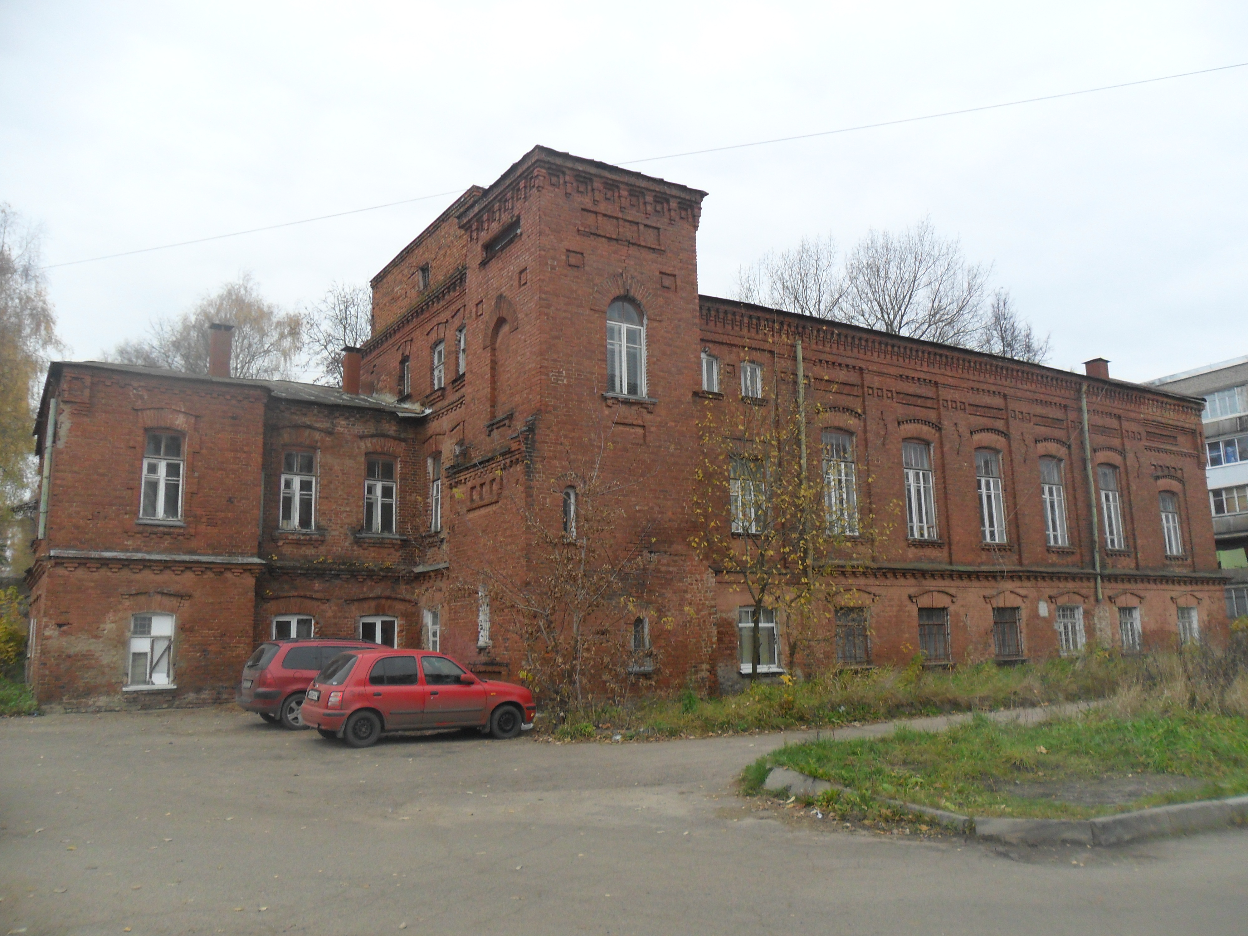 Комплекс Нарвских казарм. Бывшее здание офицерского собрания.